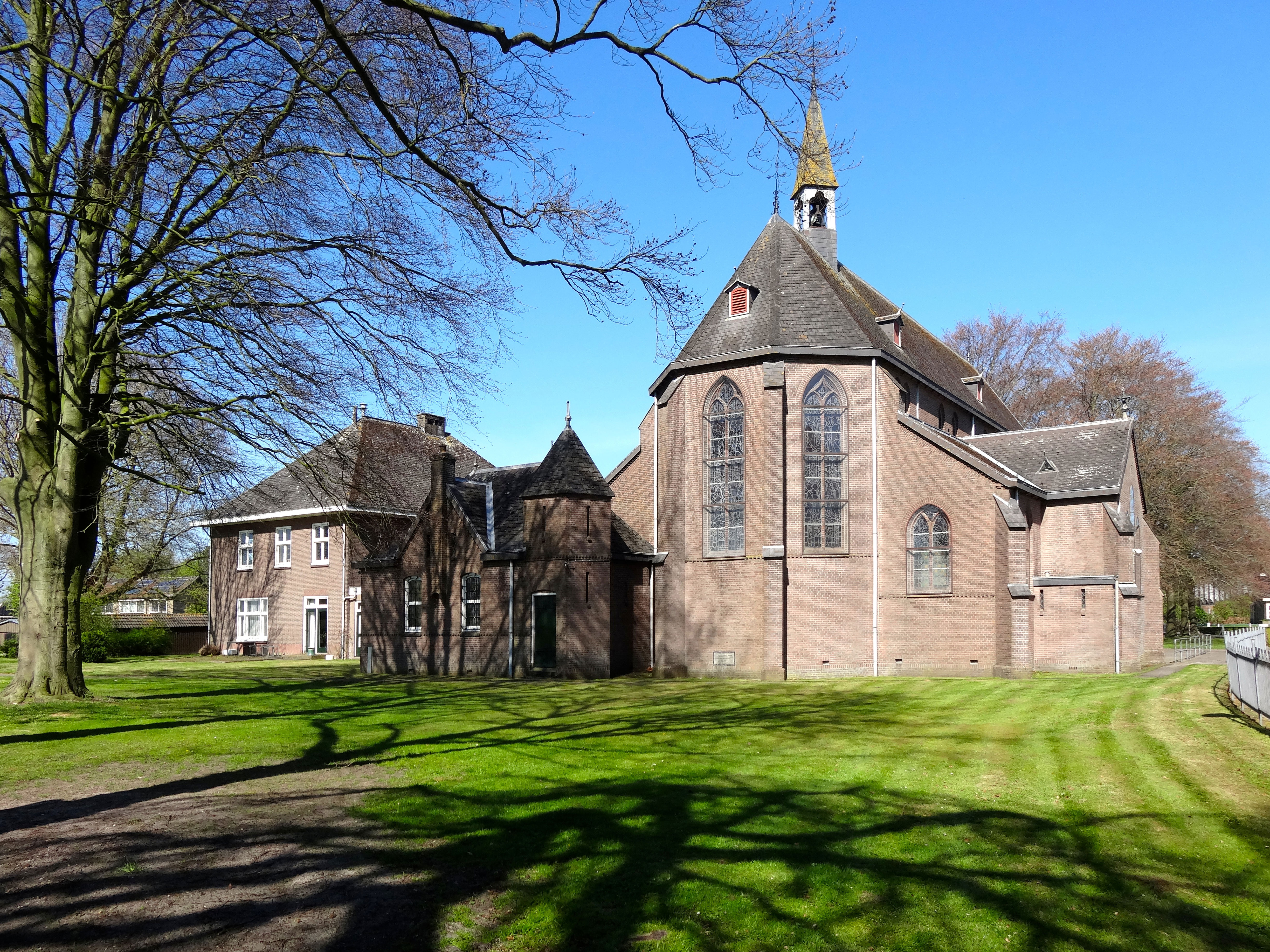 Andreaskerk in Geldringen, Steenwijkerwold